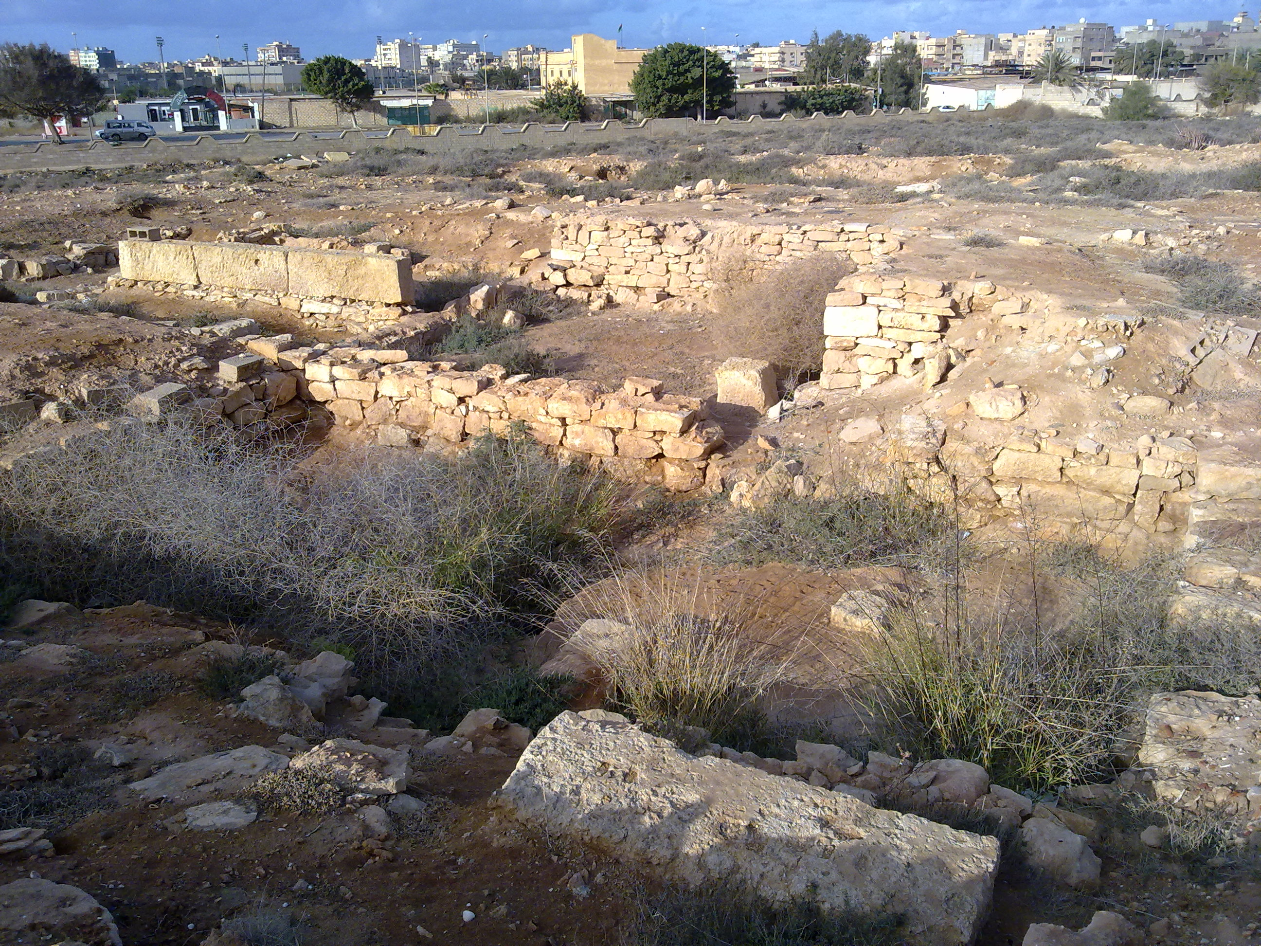 Hesperides ruins, Benghazi.